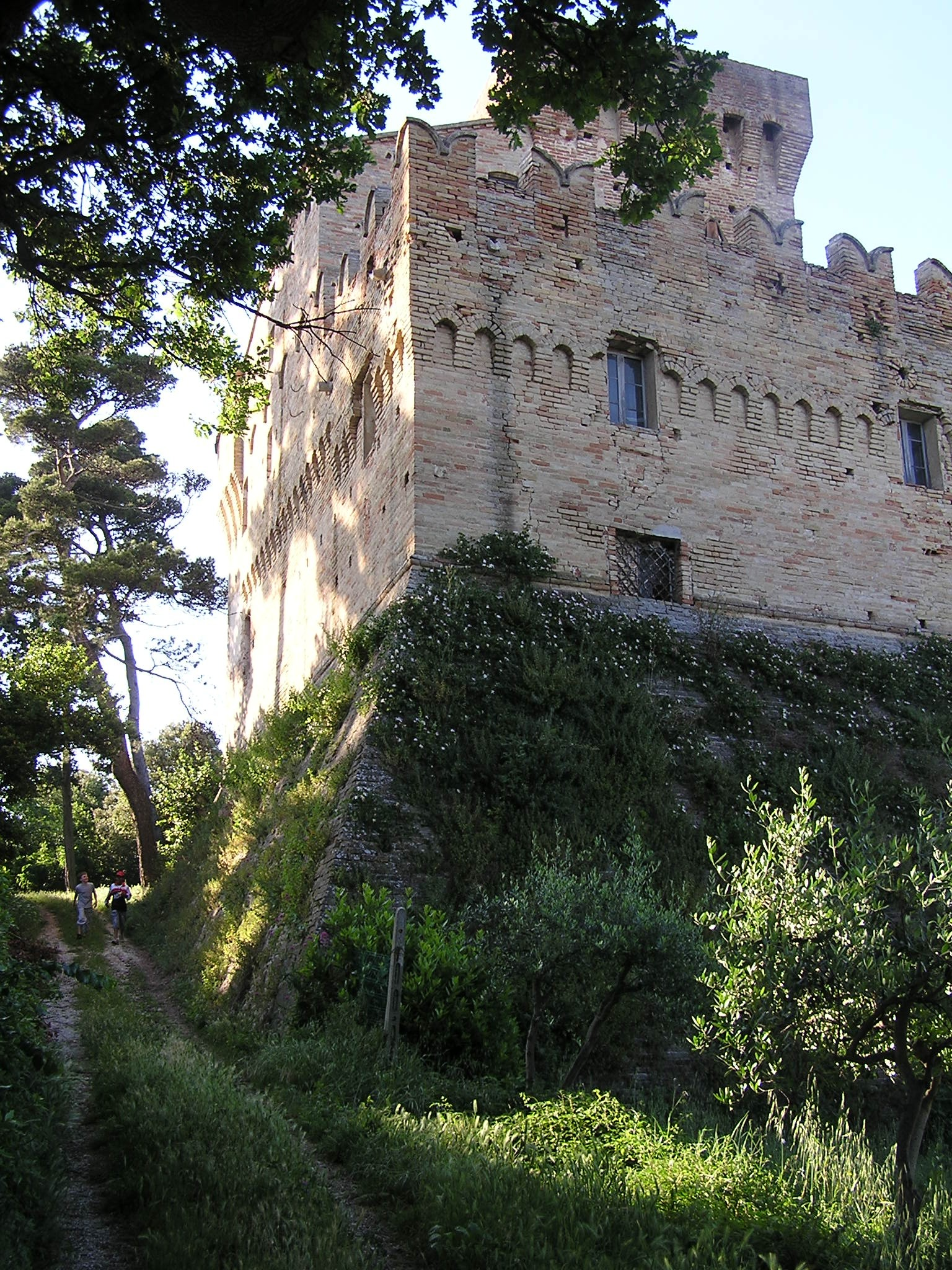 La rocca di Bolignano è uno castelli che nel Medioevo e nel Rinascimento avevano il compito di difendere Ancona; conserva ancora numerose caratteristiche originarie ed è proprietà privata e bene tutelato dalla Soprintendenza. Alcuni castelli di Ancona sono oggi comuni indipendenti dal capoluogo: Falconara Marittima, Monte San Vito, Camerata Picena, Agugliano, Polverigi, Offagna, Camerano, Sirolo. Altri sono oggi frazioni di Ancona: Montesicuro, Gallignano, Sappanico, Poggio, Varano, Massignano, Paterno. Altri ancora, infine, sono frazioni di altri comuni: Rocca Priora di Falconara, Cassero di Camerata Picena, Castel d'Emilio di Agugliano. La Rocca di Bolignano è un caso a parte, in quanto intorno ad essa non si è mai formato un centro abitato, ma è tuttora quasi isolata tra il verde della sua collina, la qual cosa ne ha certo favorito la conservazione.